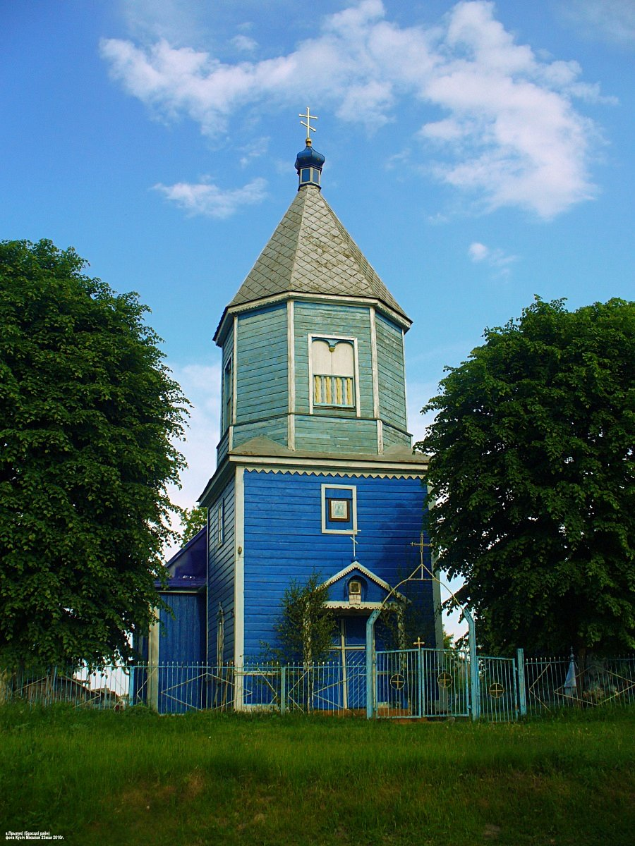 Прылукі. Свята-Пакроўская царква